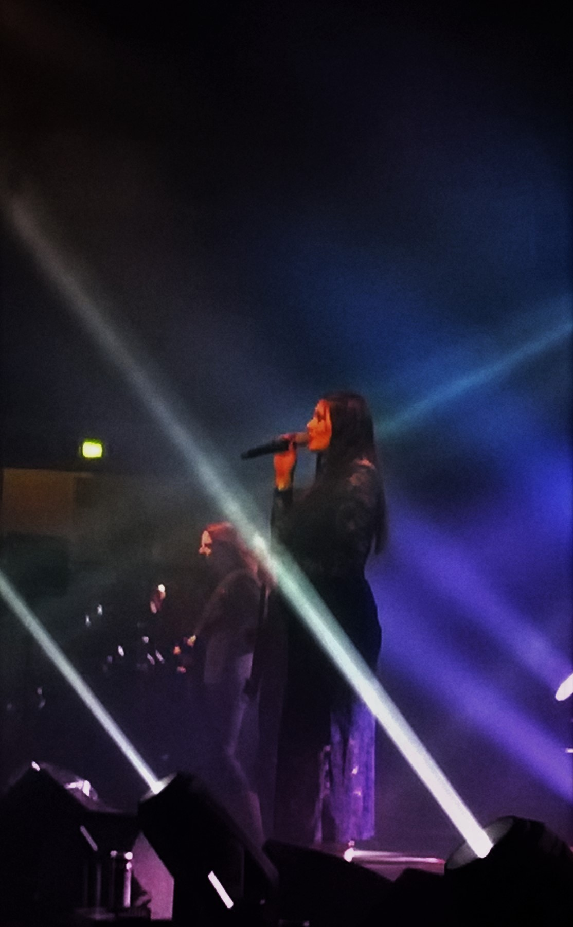 Raskasta Joulua konsertti vuonna 2016, kuvassa Floor Jansen.